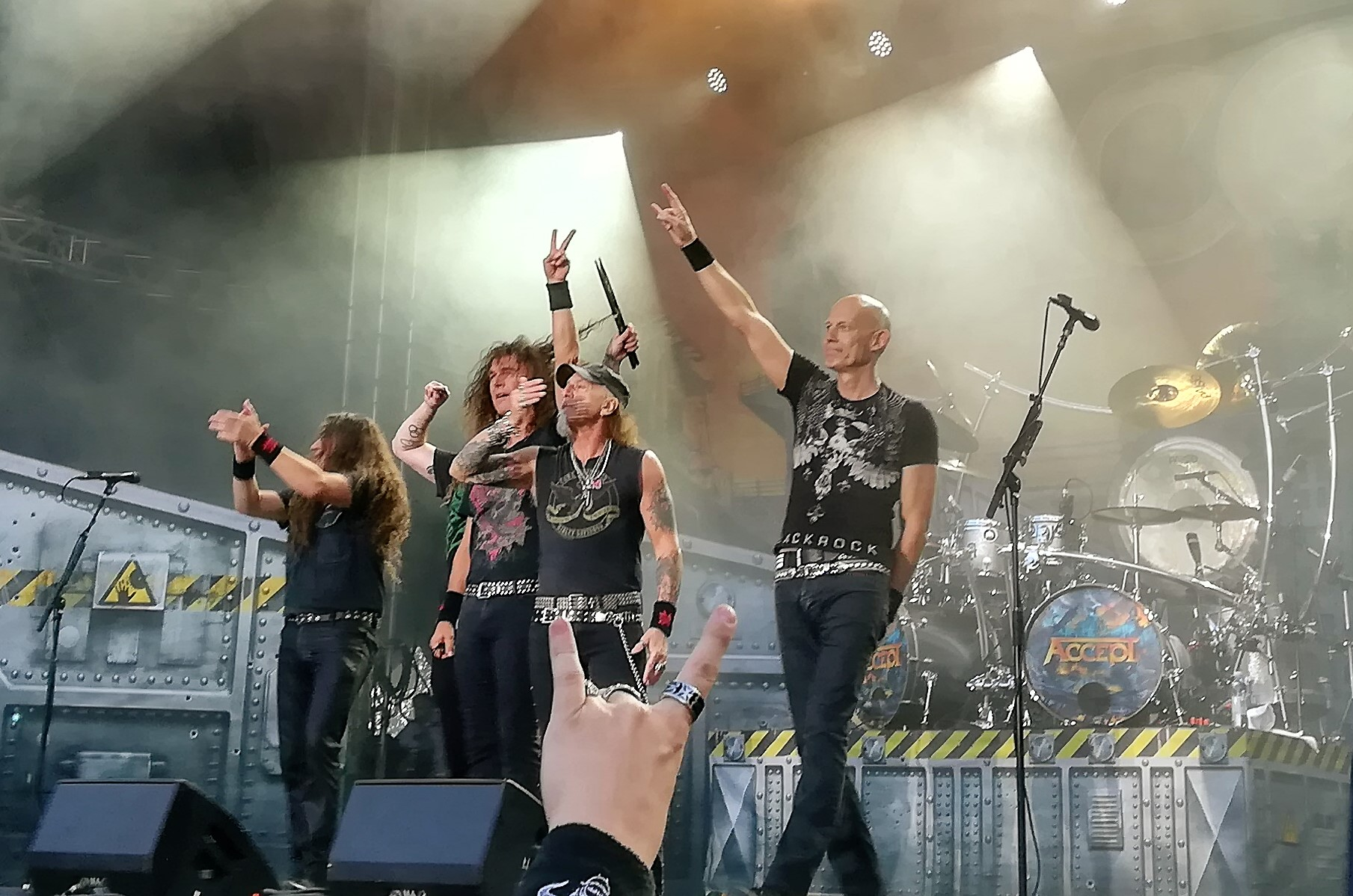 Accept South Park, Tampere 9.6.2018